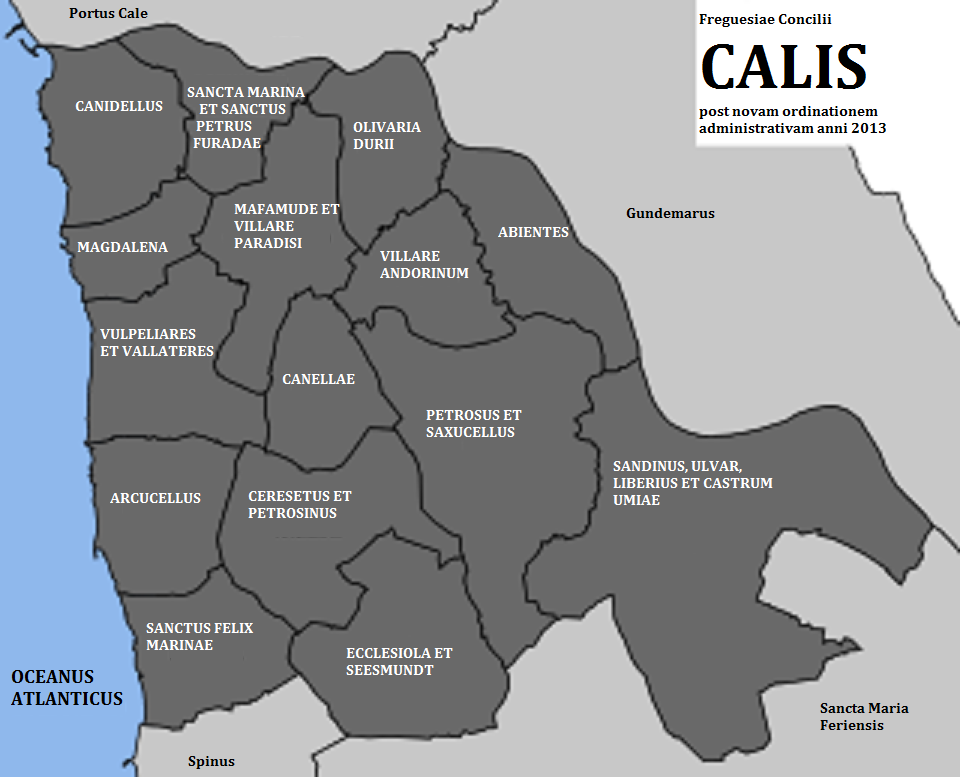 Concilii Calis freguesiae post novam anni 2013 ordinationem administrativam.